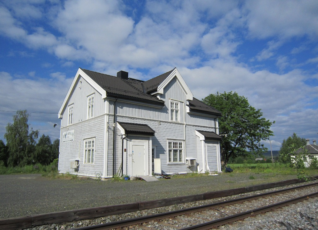 Heradsbygd stasjon på Solørbanen